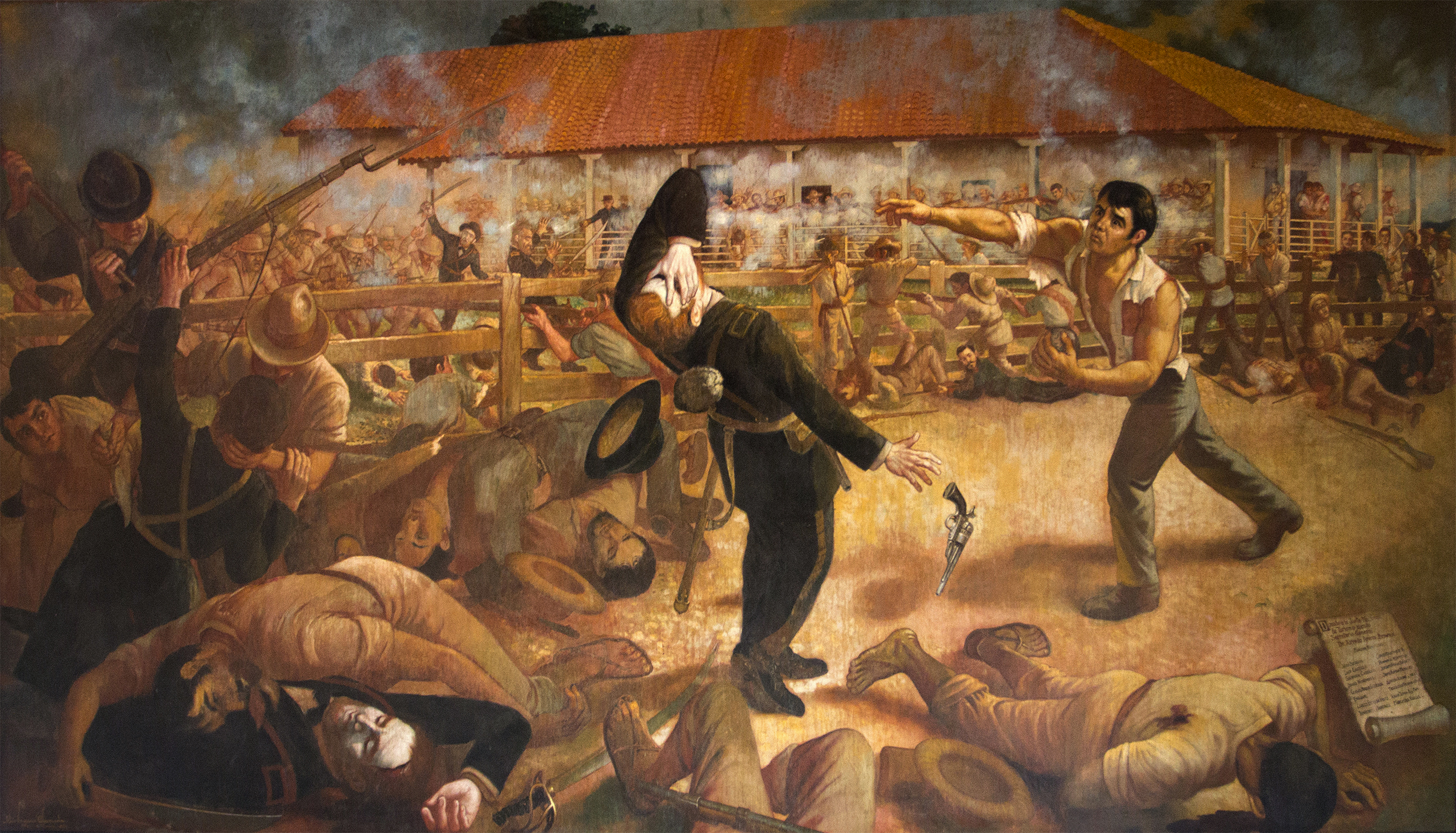 Representación de La Pedrada, escena de Andrés Castro derribando a un invasor filibustero en la Batalla de San Jacinto durante la Guerra de 1856 en Nicaragua. Óleo sobre tela realizado por el pintor chileno Luis Vergara Ahumada.